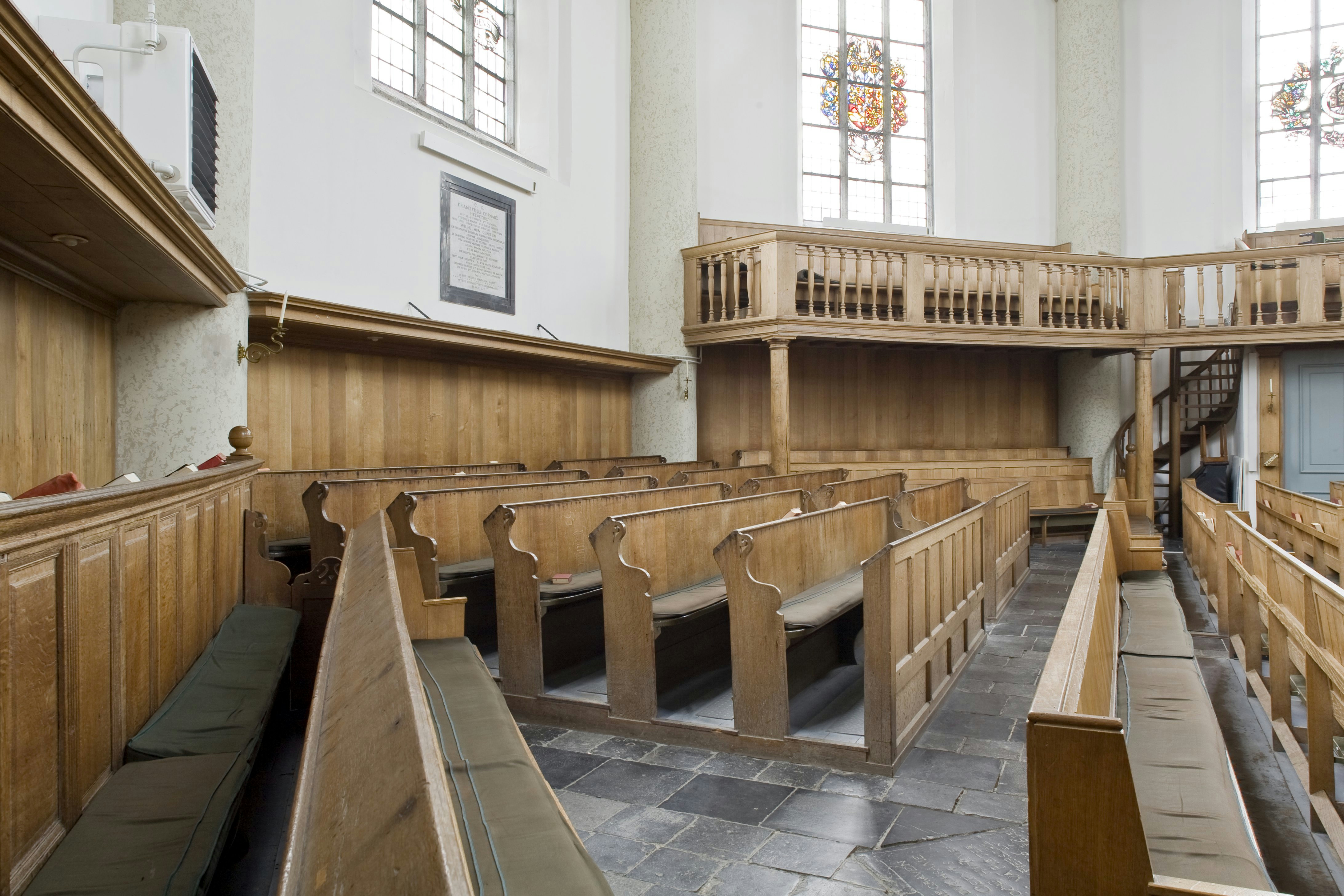 Hervormde Kerk - Koepelkerk: Interieur, overzicht op houten lambrisering en kerkbanken